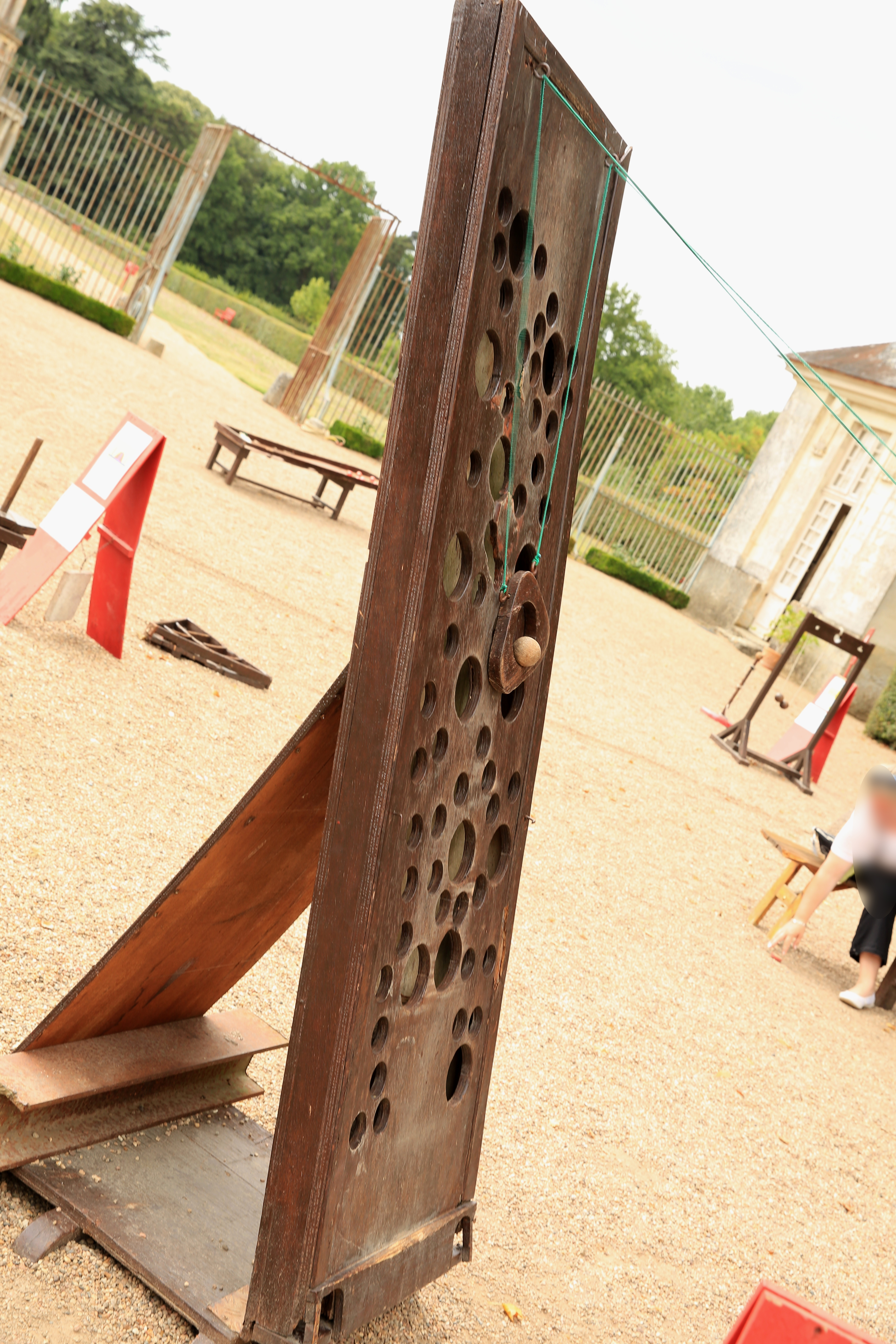 Gruyère ou remonte-balle. Jeu traditionnel en bois à l'entrée du Domaine de Chanteloup. Il faut faire remonter la boule le plus haut possible. La planche est divisée en 4 parties : 1 point en bas, puis 2, 3 et 4 points.